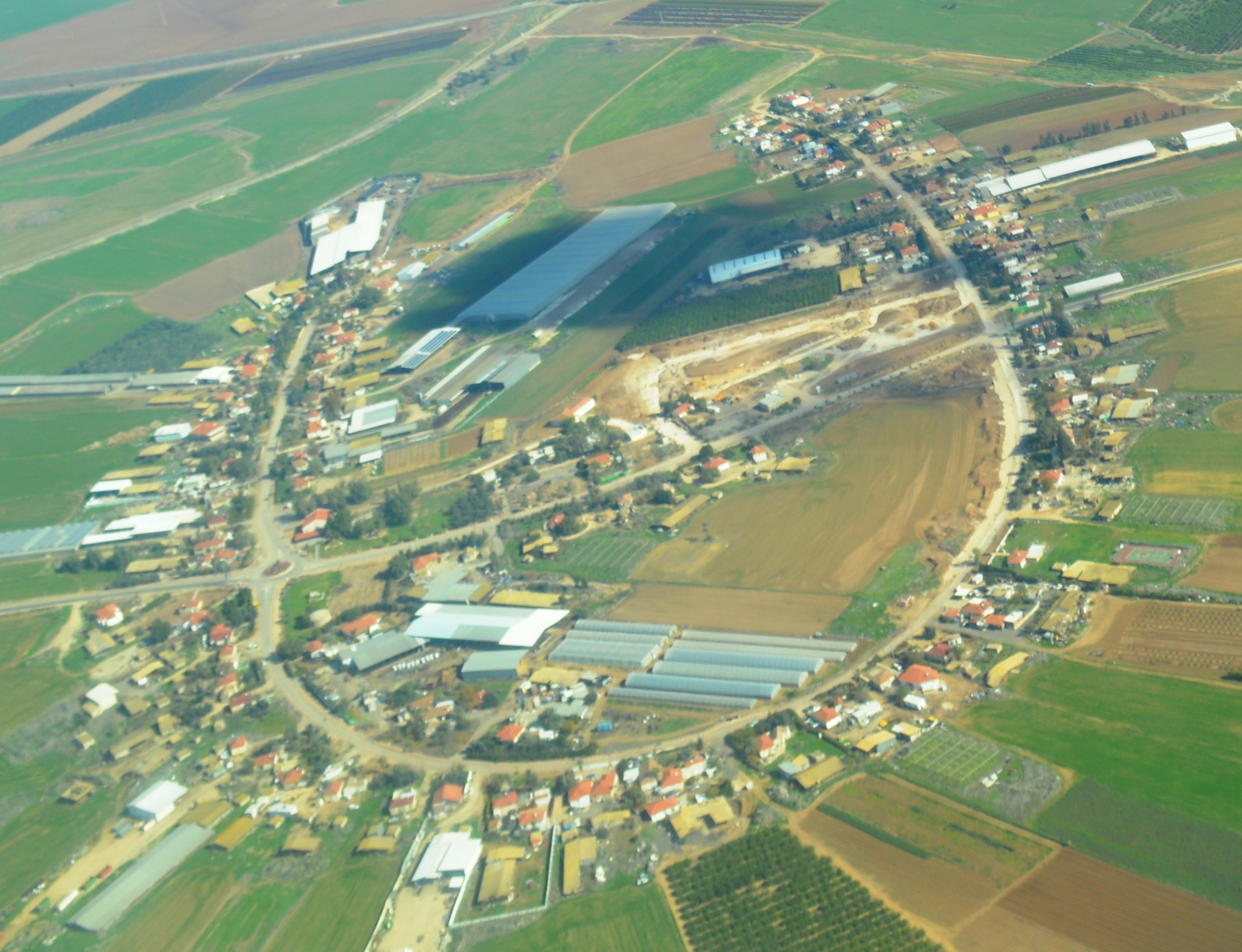 צילום אוויר - מושב שלווה